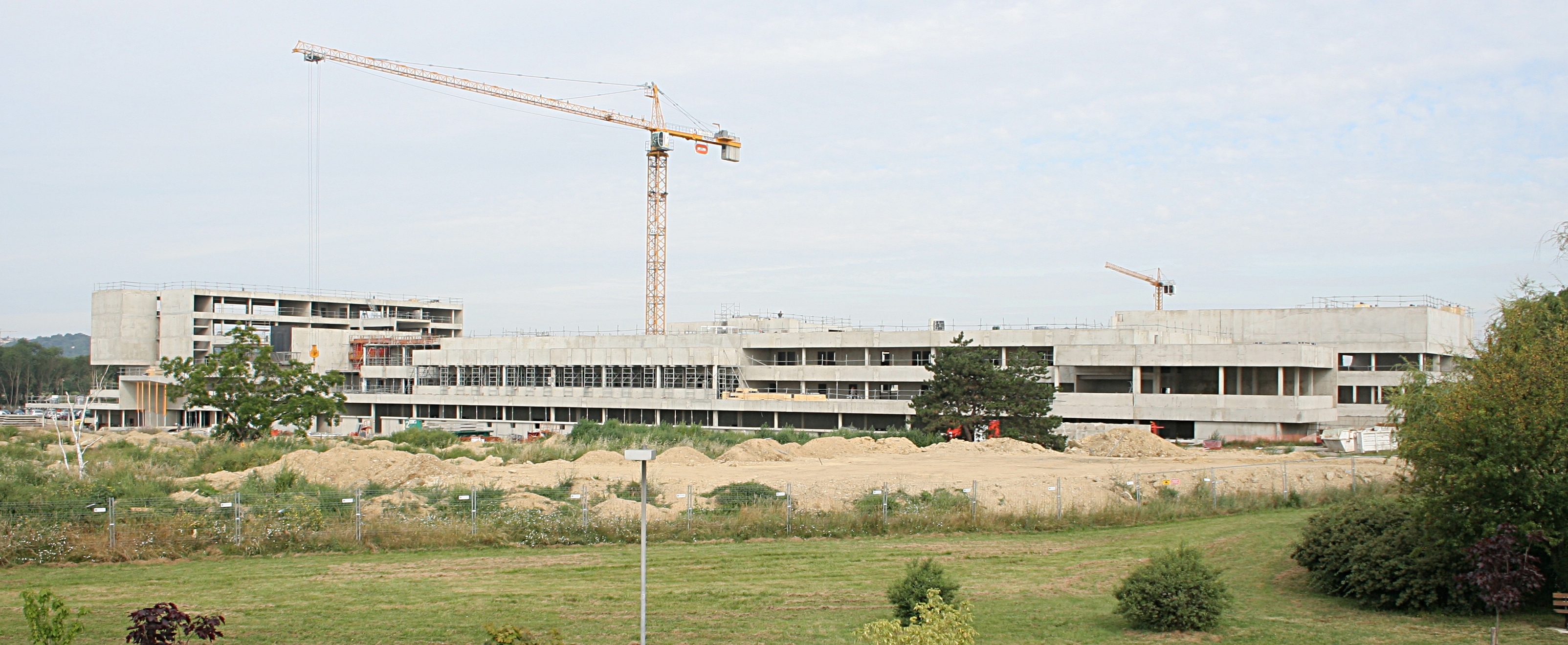 Chantier de l'ENSIACET à Labège.